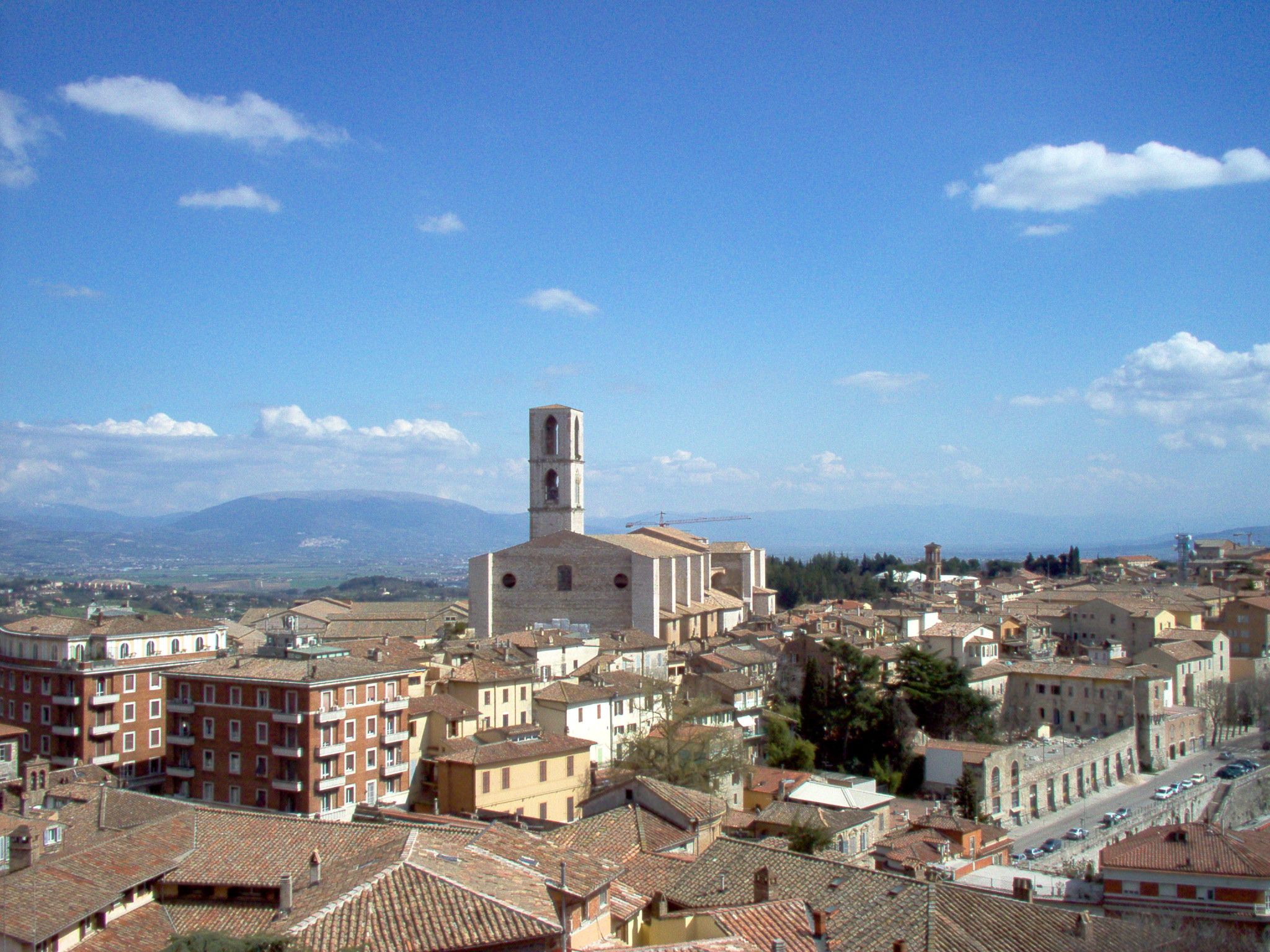 by Attilio Funel, April 2 2006